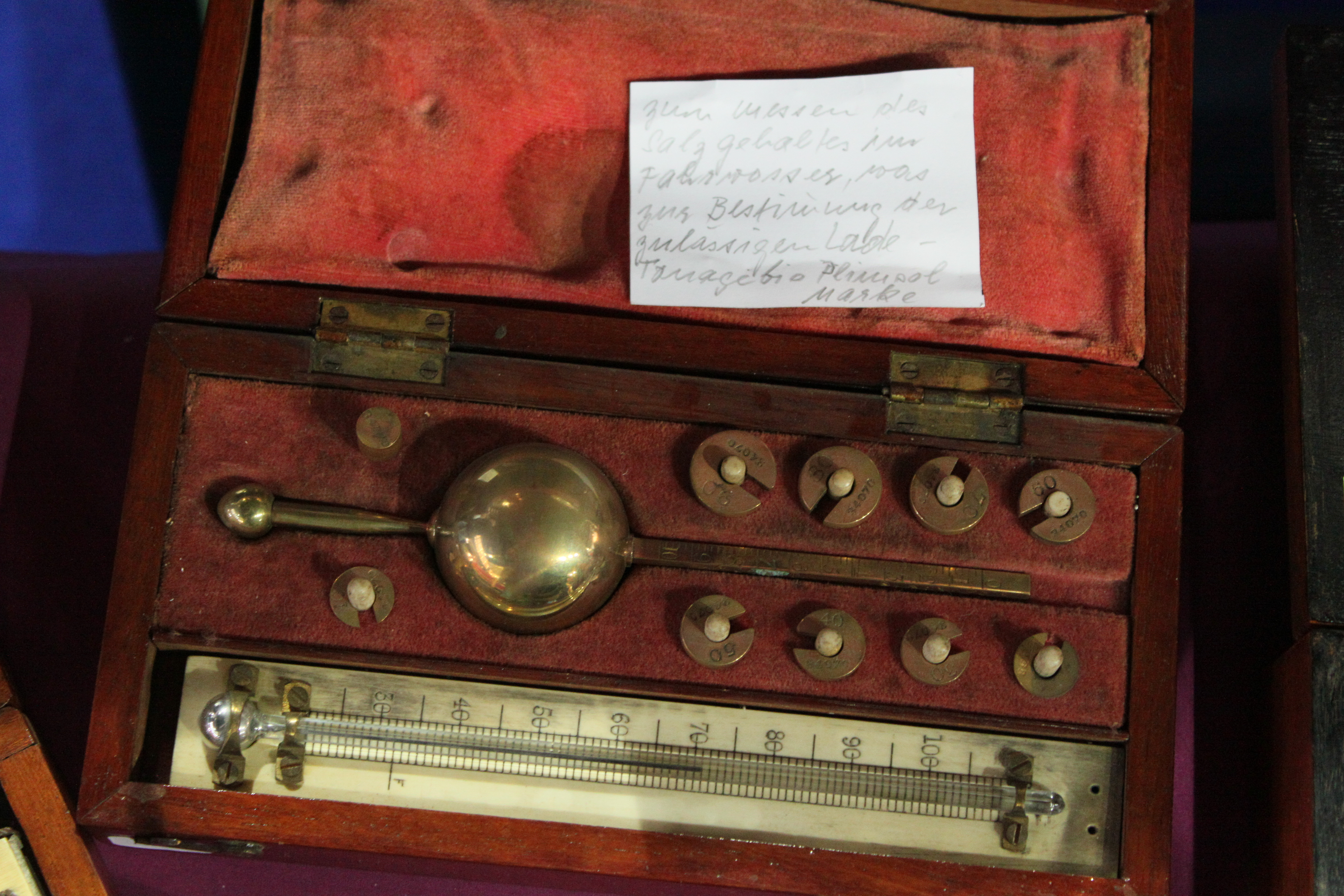 wahrscheinlich ein Gewichtsaräometer - zum Messen des Salzgehaltes im Fahrwasser, was zur Bestimmung der zulässigen Ladung ... , gesehen auf der Messe Bremen "Boatfit 2011"